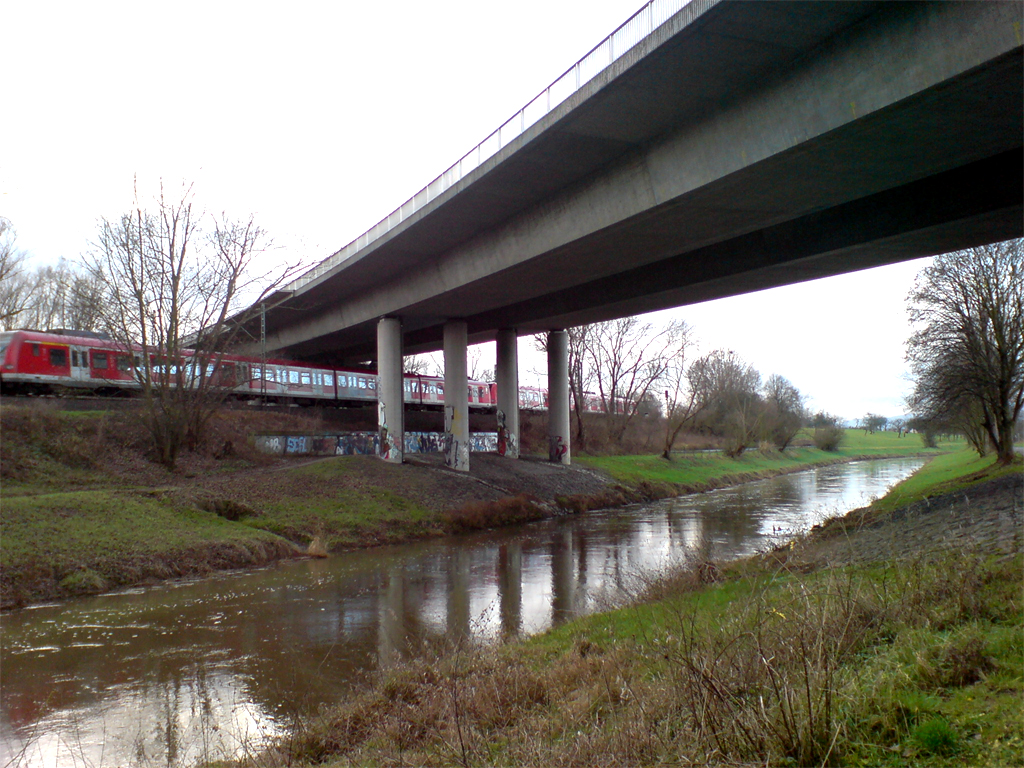 Niddabrücke der Bundesstraße 3 (rechts: Bad-Vilbel-Heilsberg, gegenueber: Frankfurt-Berkersheim / Main-Weser-Bahn (S-Bahnlinie 6)